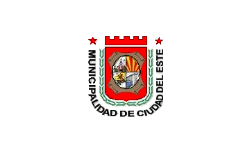 Bandera de Ciudad del Este